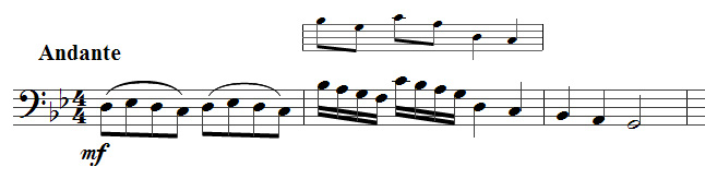 Ossia example